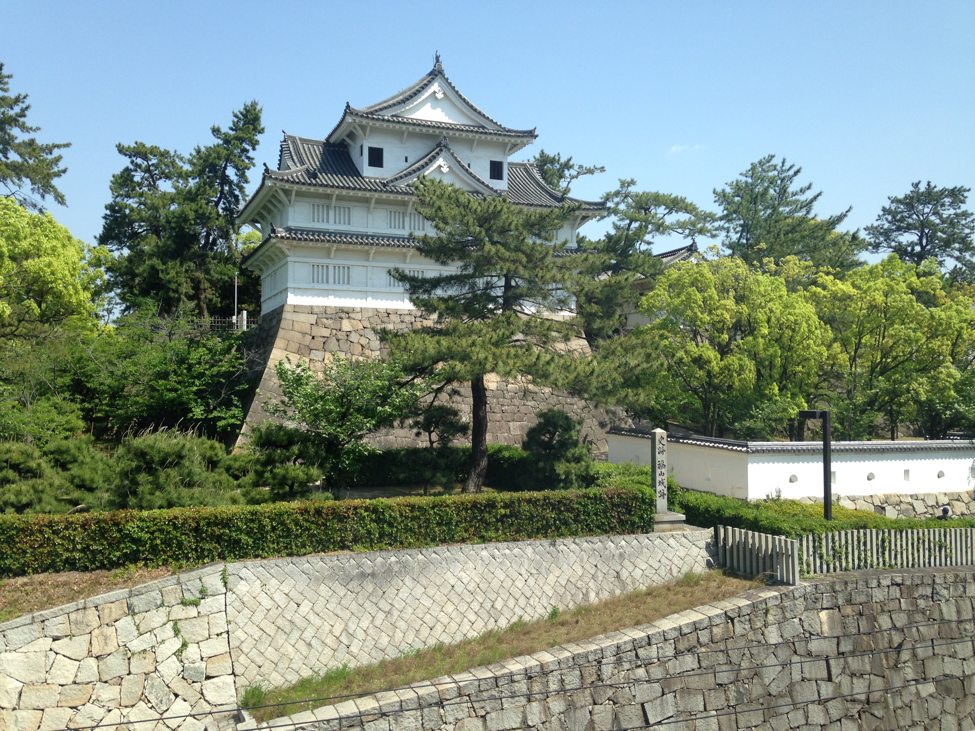 福山駅の新幹線ホームから撮影する福山城伏見櫓